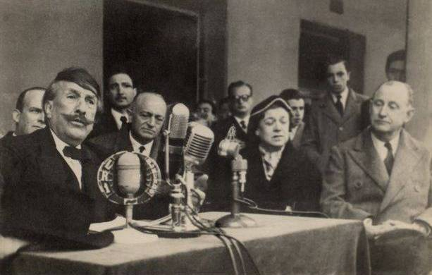 Alfredo Lorenzo Palacios (1878 - 1965), avocat, homme politique et prof. d'université argentin.